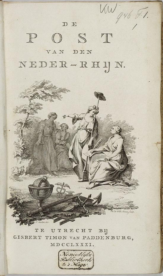 Titelblad van het Nederlandse patriotse tijdschrift De Post van den Neder-Rhijn in 1781.